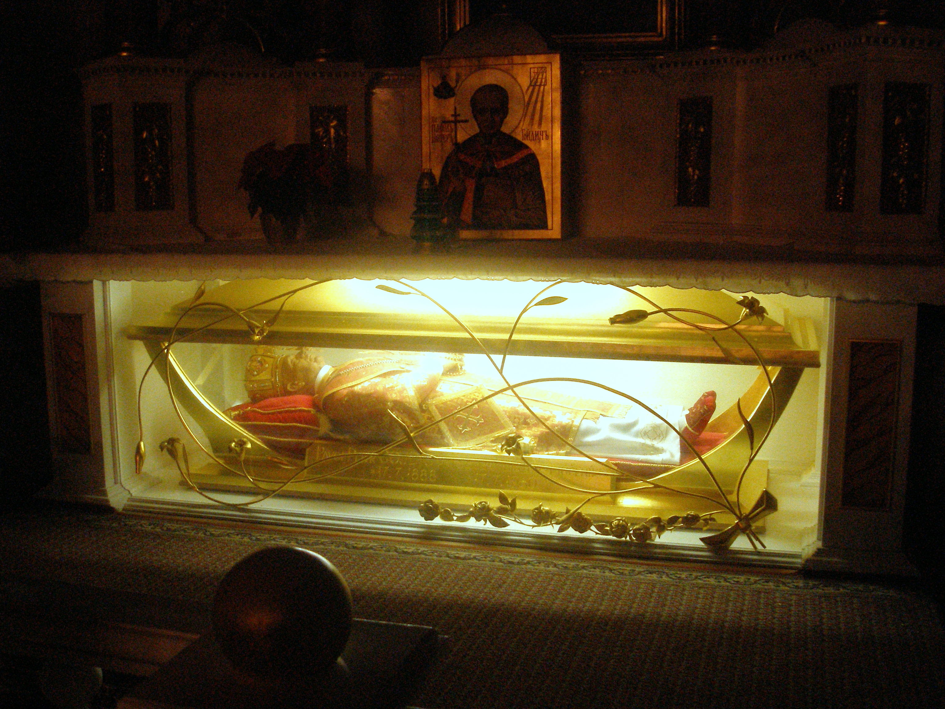 Sarkofág s pozostatkami blahoslaveného biskupa Petra Pavla Gojdiča v Katedrále sv.Jána Krstiteľa v Prešove na Hlavnej ulici.